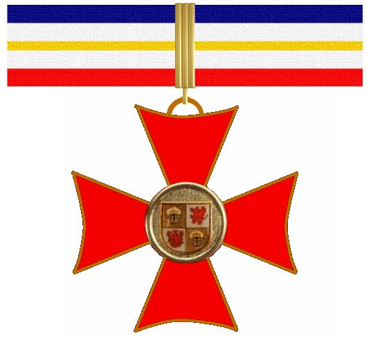 Verdienstorden Mecklenburg-Vorpommern (grafische Darstellung)